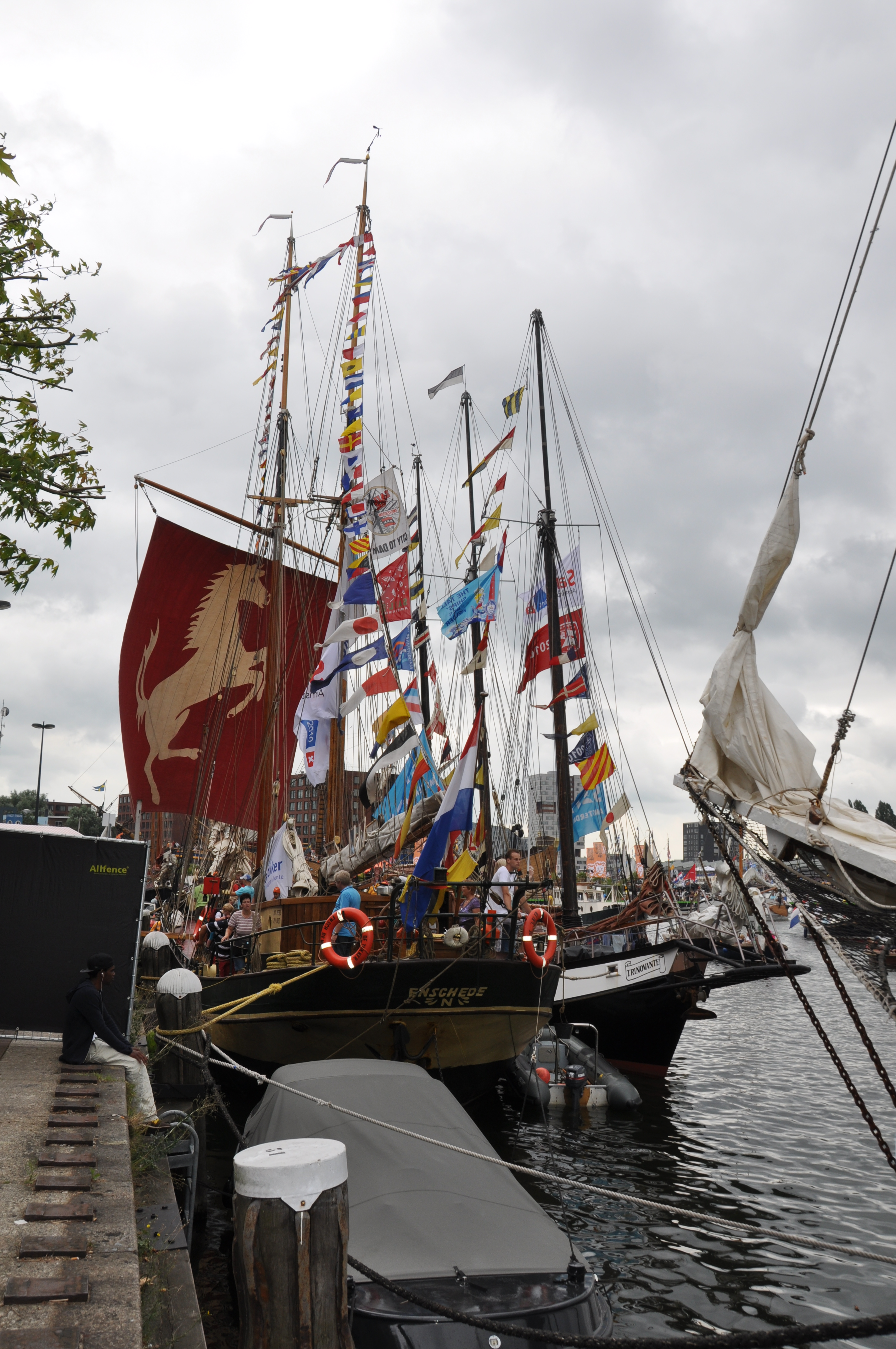 DE TUKKER uit Enschede op Sail Amsterdam 2010